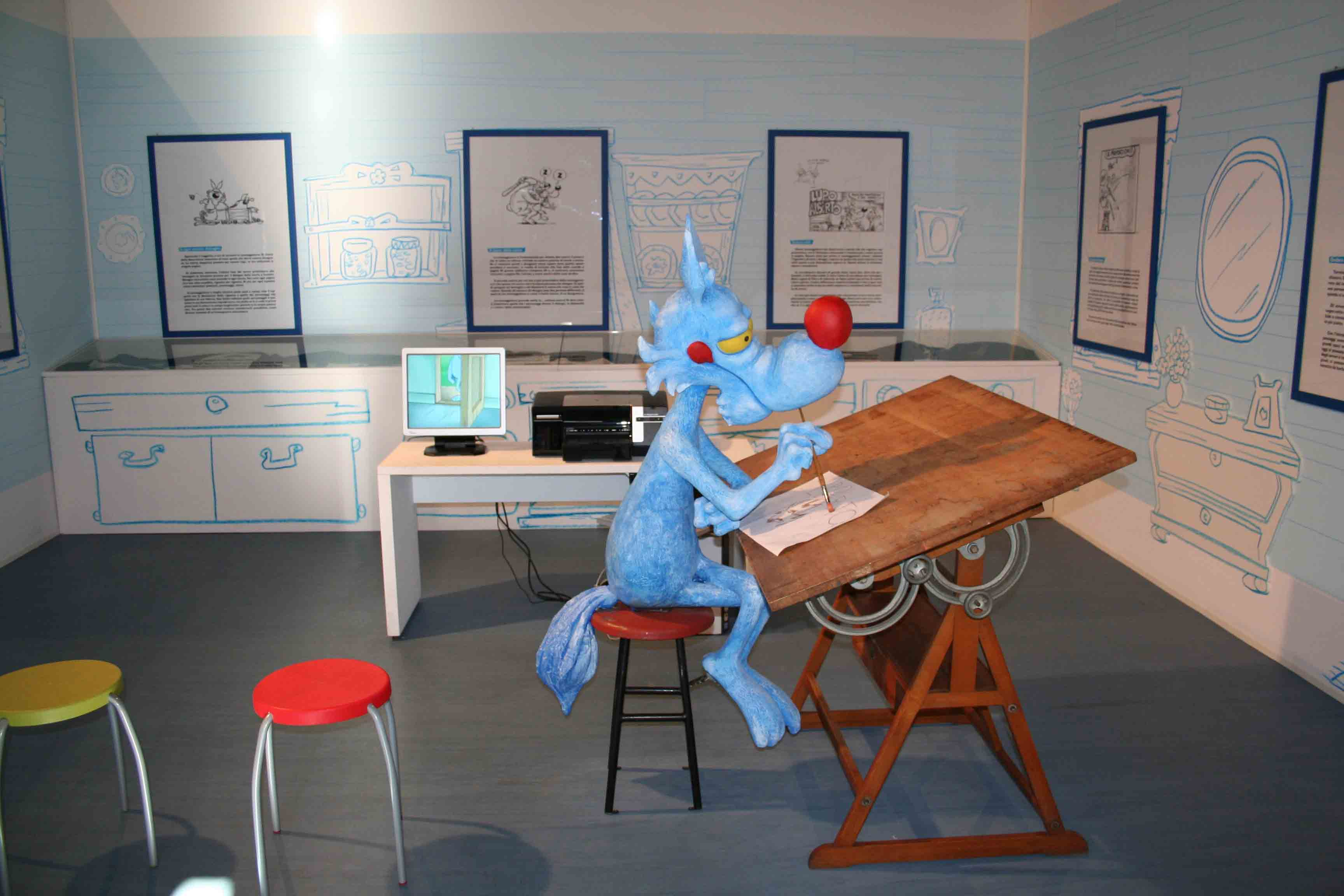 Foto e opera realizzate da Roberta Traversa e Renzo Pardini per il Museo del fumetto e dell'Immagine